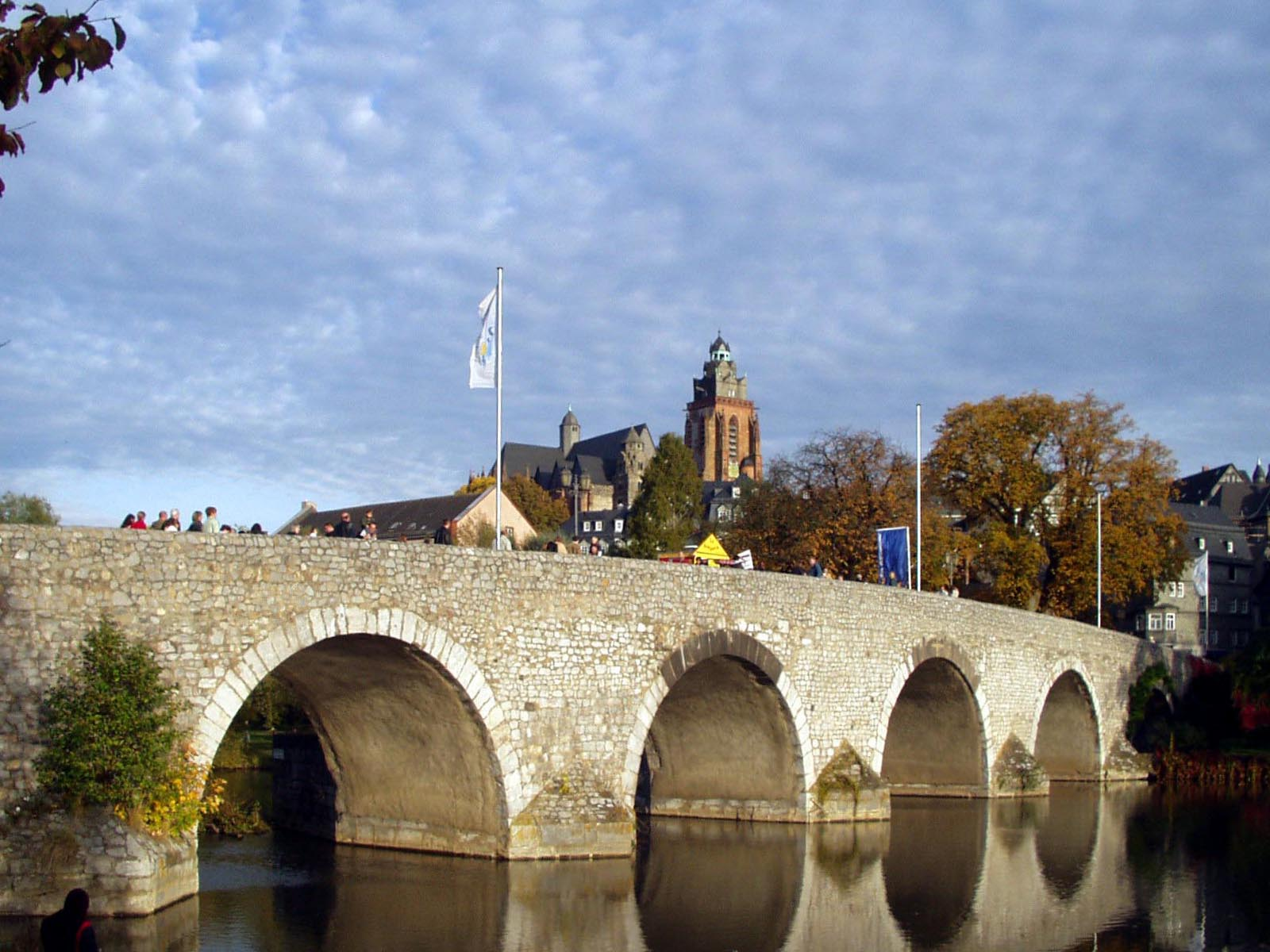 Brücke über die Lahn in Wetzlar